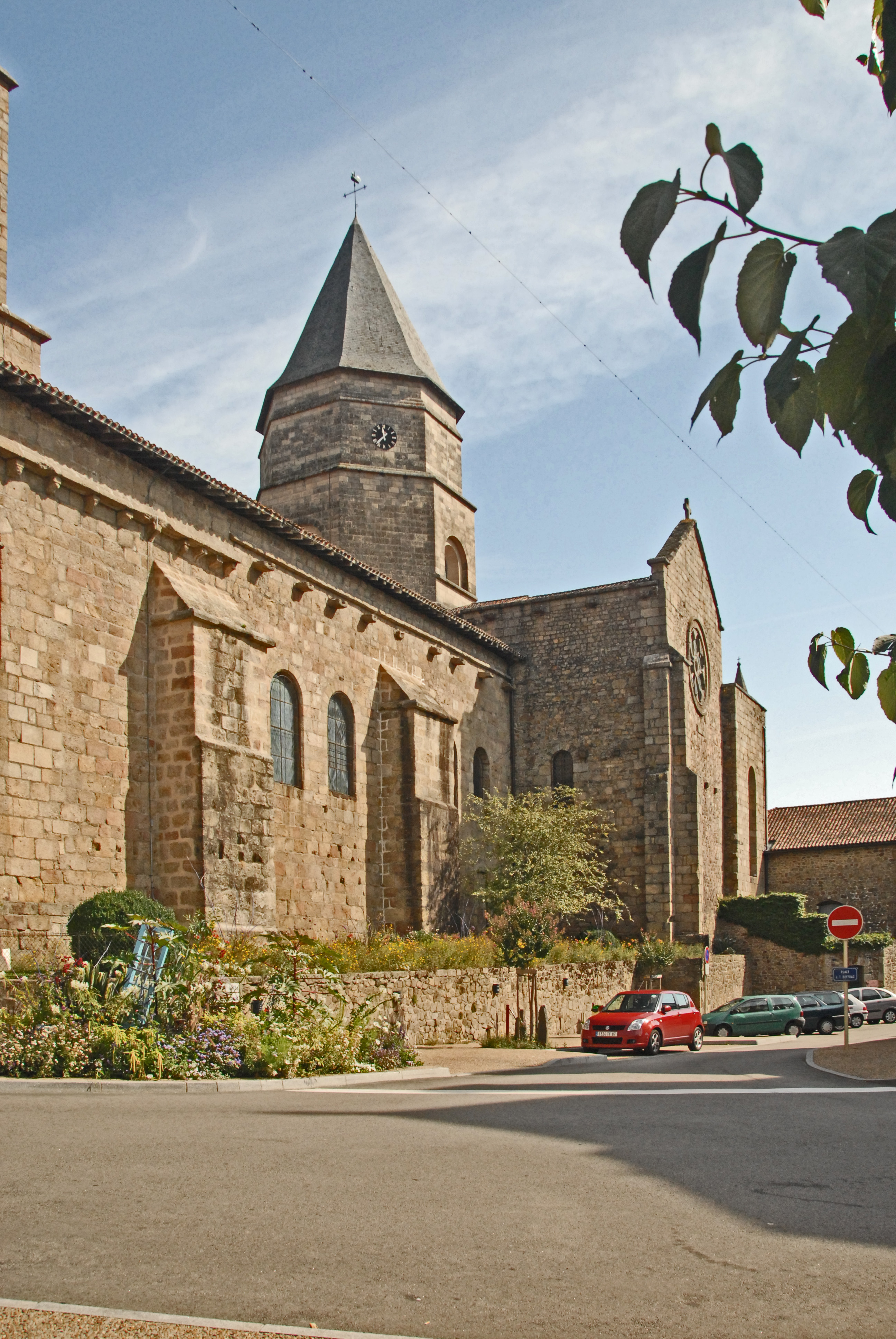 St-Junien, Langhaus Südseite, Querthaus u, Vierungsturm